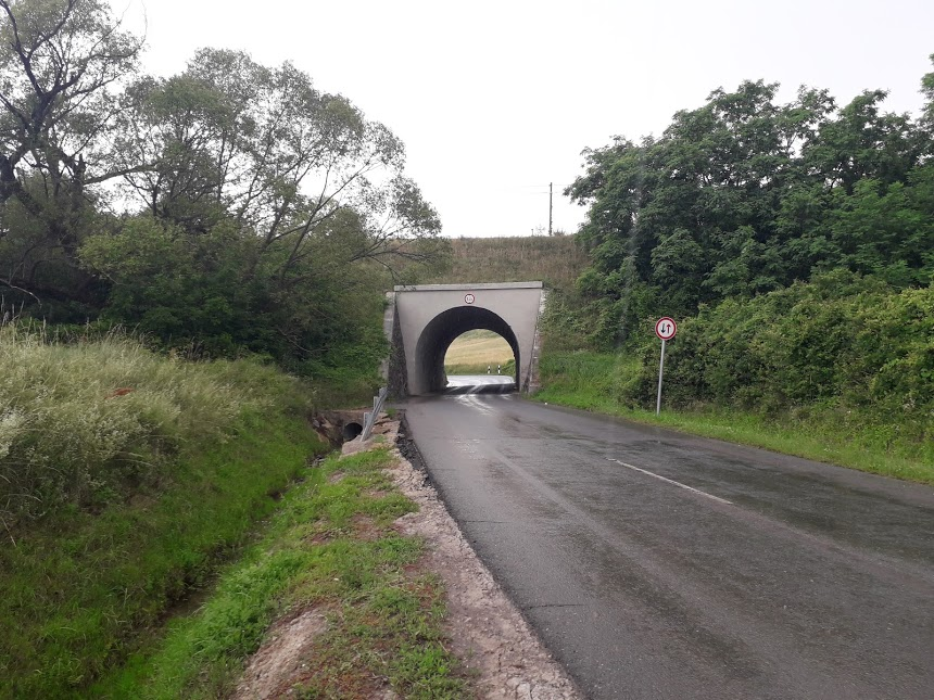 A szilvásváradi vasúti viadukt